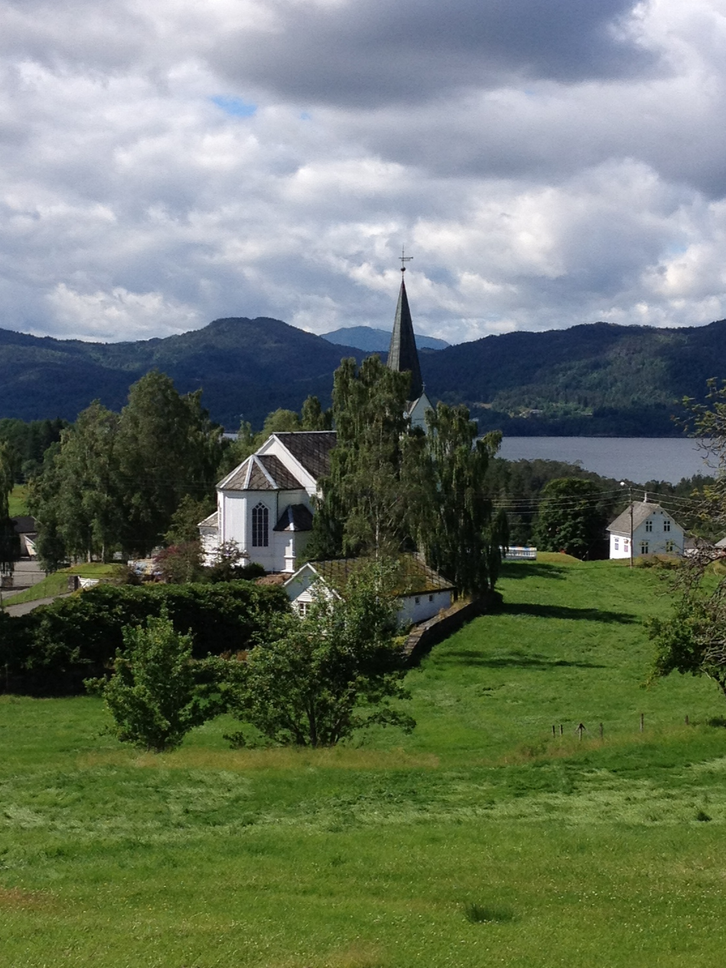 Varaldsøy Kirke, bilde tatt fra den gamle kirkegården